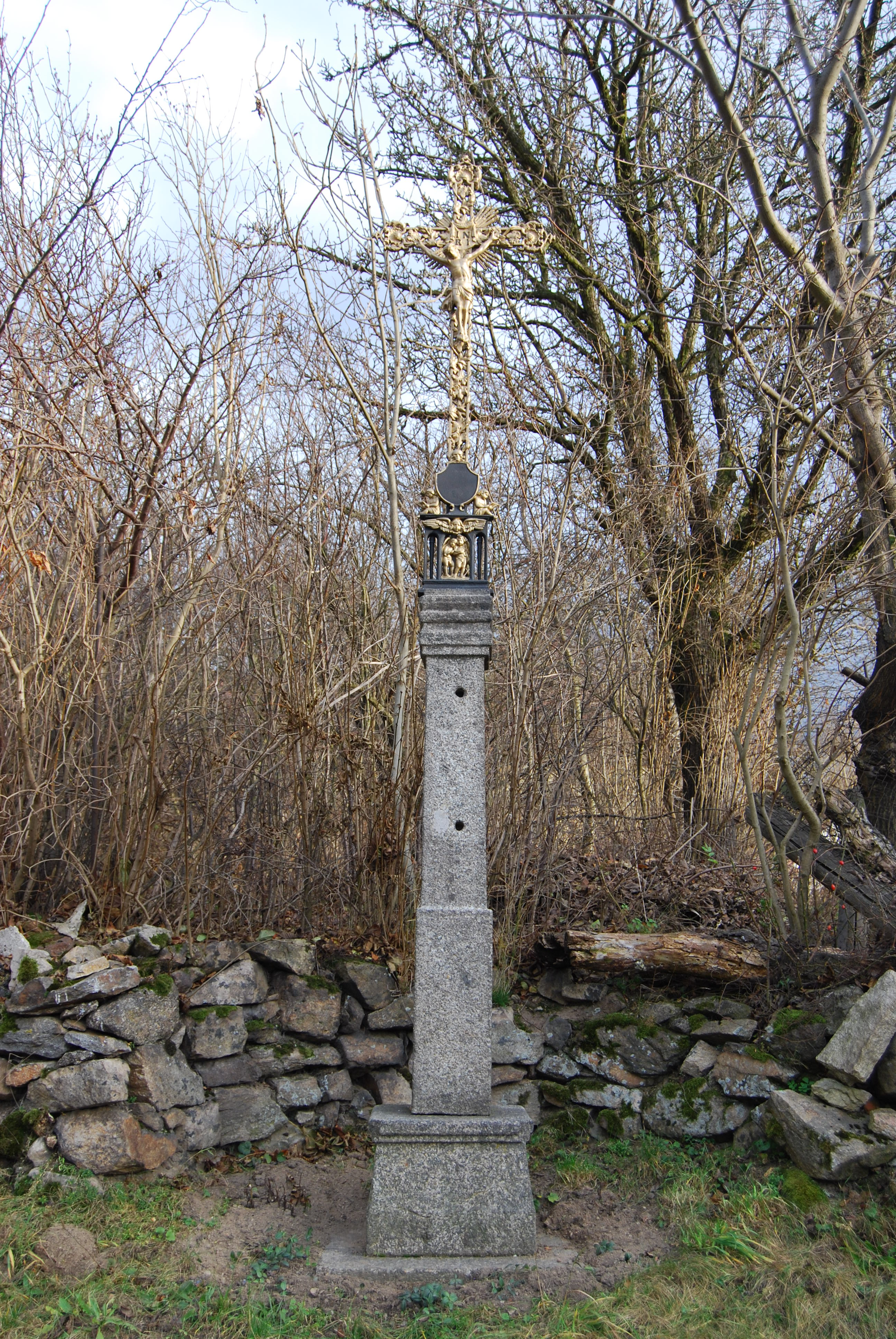 Kříž přímo v obci. Paseky. Okres Písek. Česká republika.